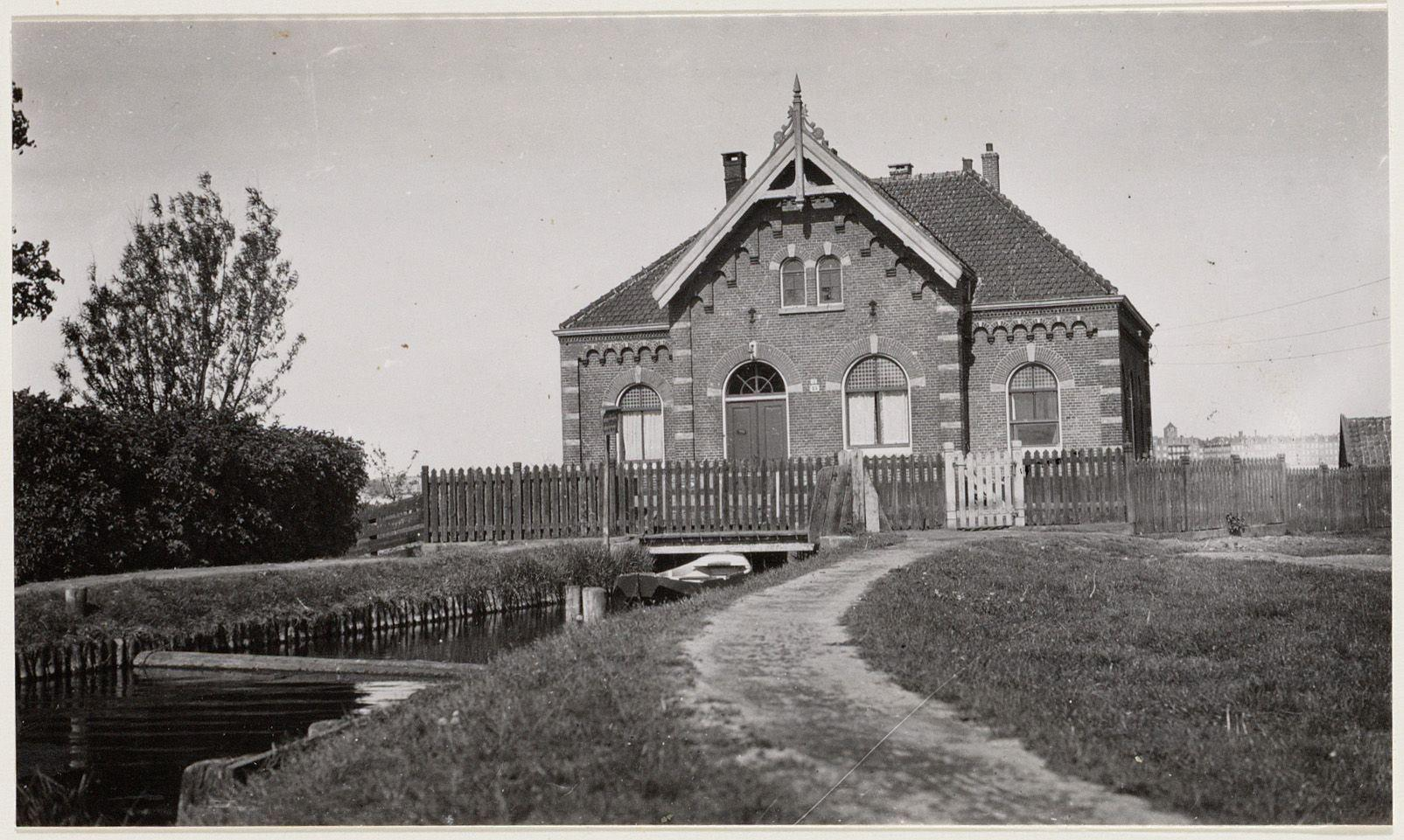 Beschrijving Flevopark, Ringsloot 13 Gemaal van de Overamstelsche of Oeterwalerpolder (gebouwd in 1880) Documenttype foto Vervaardiger Eck, J. van (Jacobus, 1873-1946) Collectie Collectie J. van Eck: foto's Datering 3 juni 1922 Geografische naam Flevopark Flevopark Inventarissen Afbeeldingsbestand A01634000363 Generated with Dememorixer